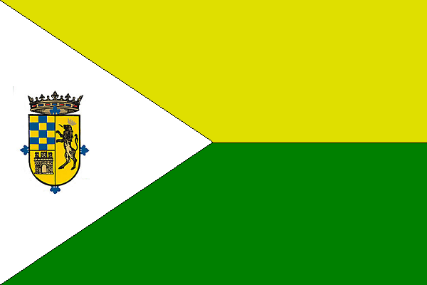 Bandera de Gálvez (Toledo)